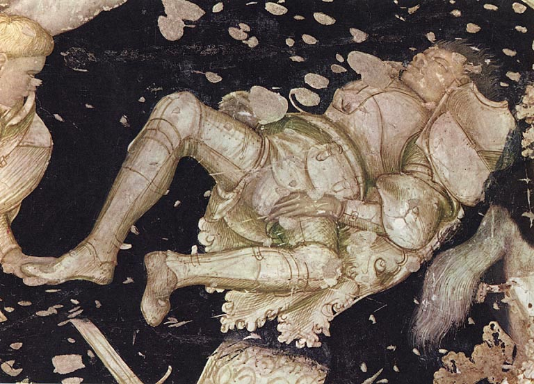 Pisanello, torneo-battaglia di liuverzep 02